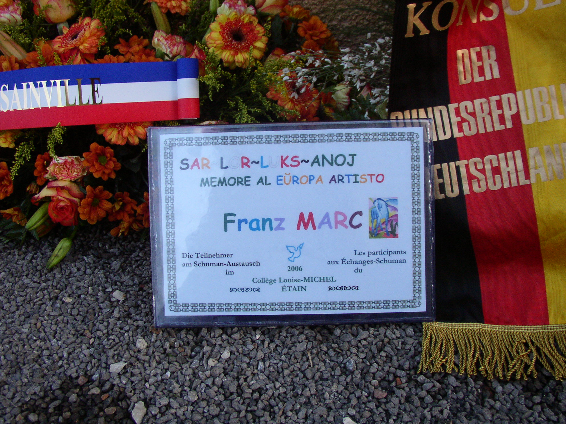 Plaque déposée lors de la commémoration du 10 novembre 2006 à Gussainville F-55400 en hommage au peintre allemand Franz Marc mort sur le champ de bataille en 1916.